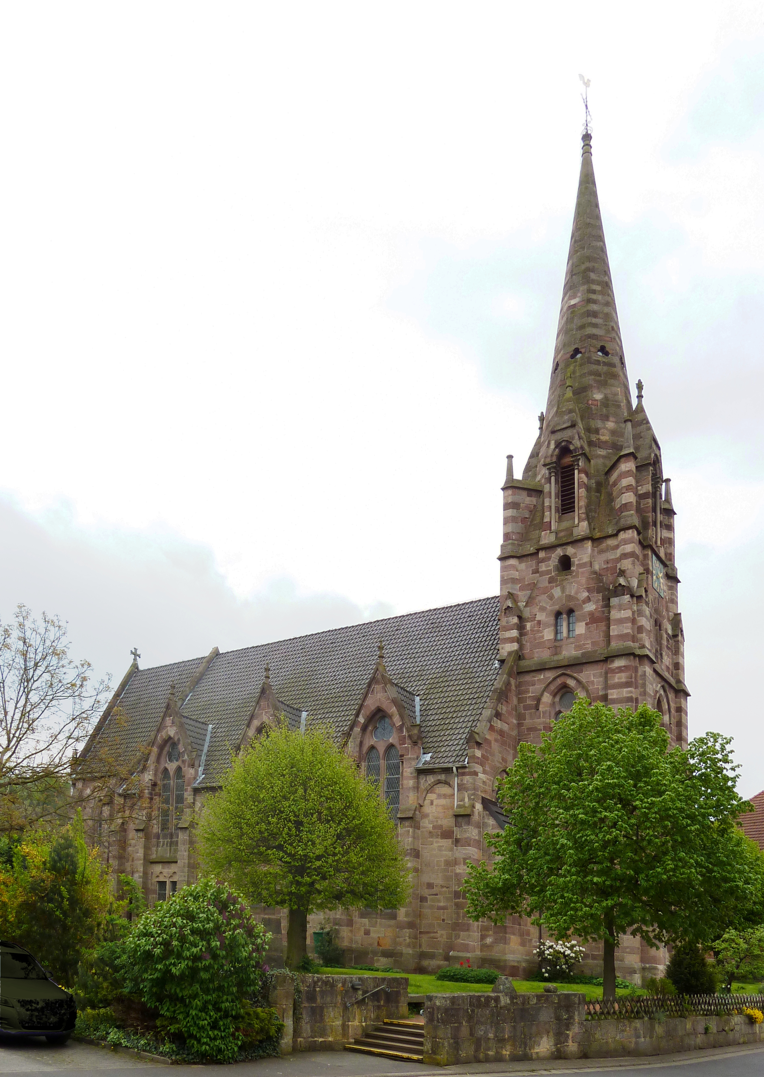 Kirchengebäude der Evangelischen Kirche von Kurhessen-Waldeck in Hundelshausen, Stadt Witzenhausen, Hessen. Erbaut 1863 bis 1876 nach Plänen von Georg Gottlob Ungewitter (1820-1864).